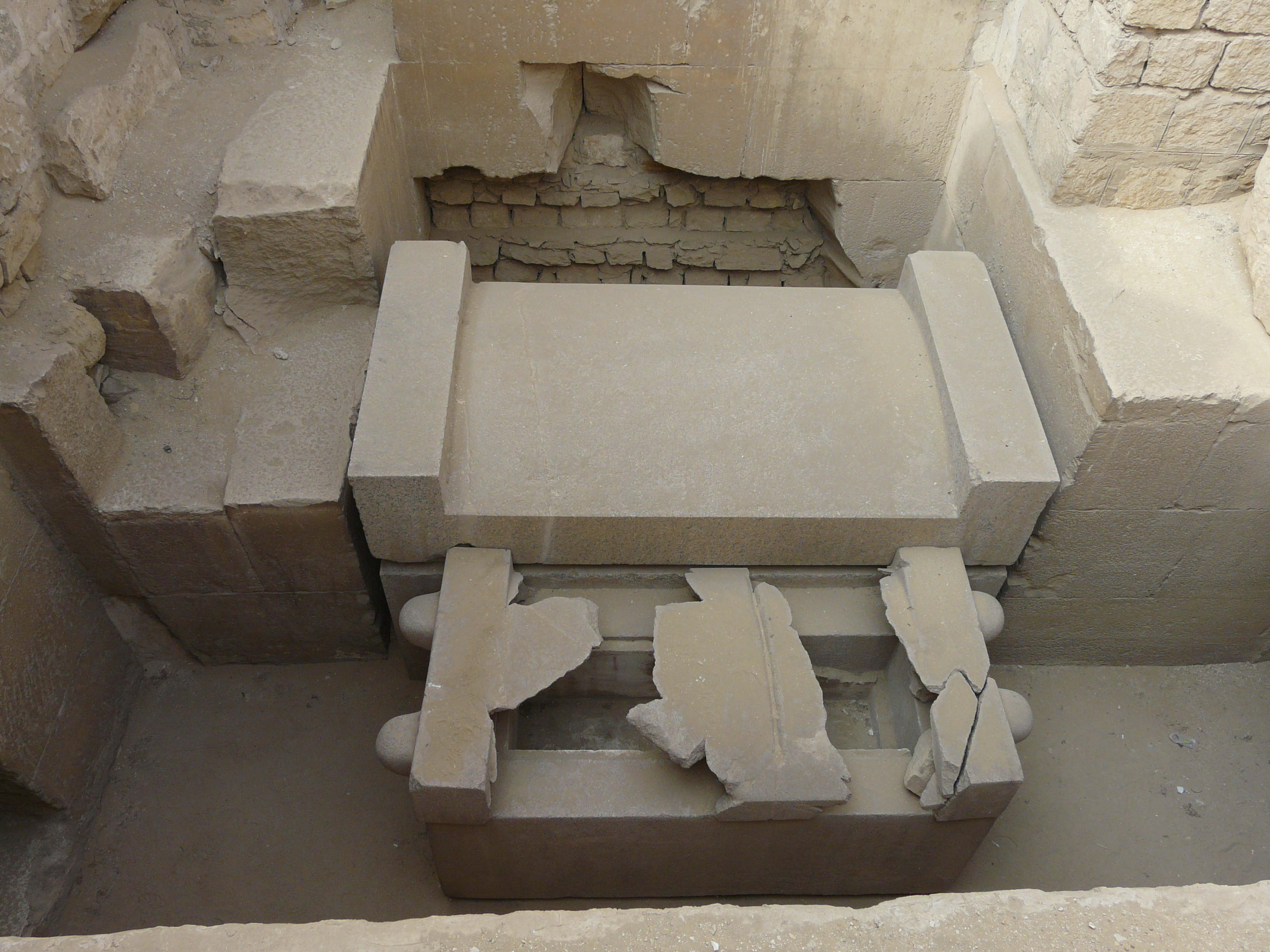 Sarcophages de Ptahchepsès et son épouse Khâmerernebti - Mastaba de Ptahchepsès, Abousir